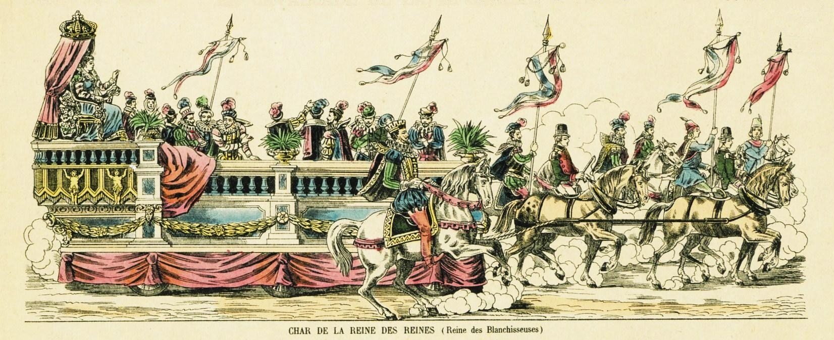 Détail d'une estampe. Imagerie d'Epinal. N° 307, La cavalcade de la mi-carême à Paris, estampe, éditeur : Pellerin & Cie, imp.-édit., Epinal, 1894, gravure sur bois en couleurs ; 29 x 40 cm